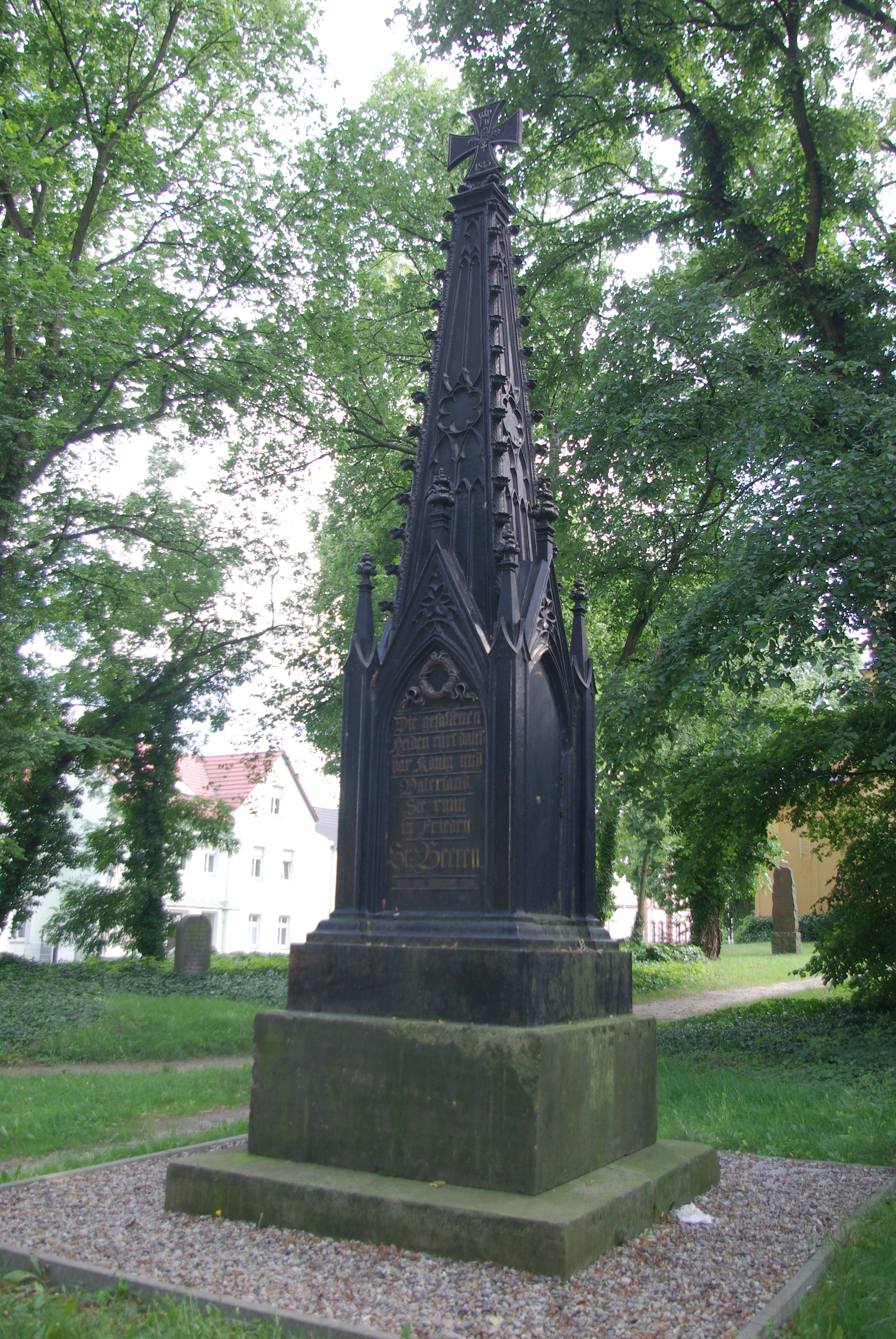 Großbeeren in Brandenburg. Der Obelisk erinnert an die Schlacht bei Großbeeren und wurde von Schinkel entworfen. Der Obelisk steht auf dem Kirchhof der Kirche von Großbeeren. Der Obelisk ist denkmalgeschützt.